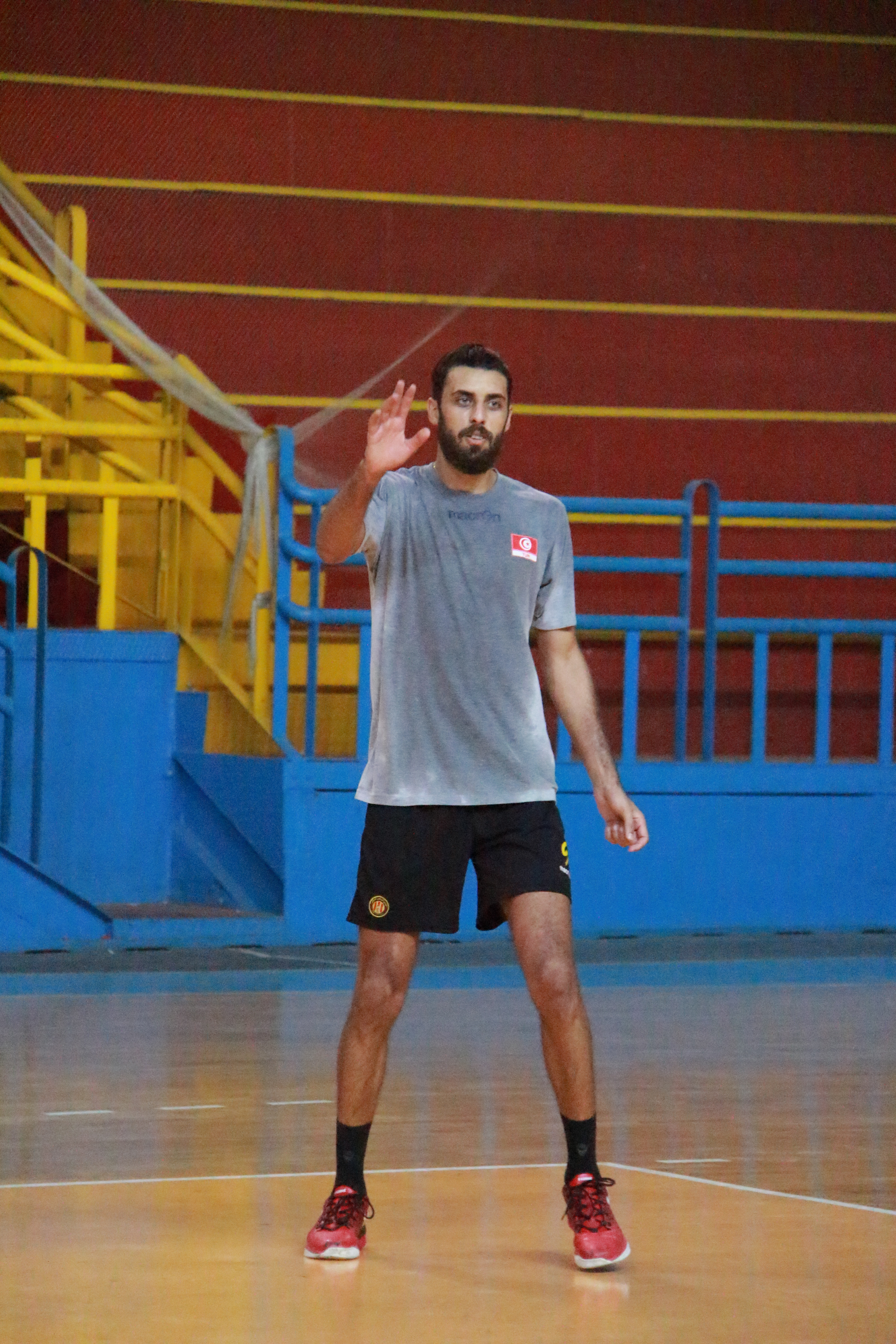 Poste : Attaquant